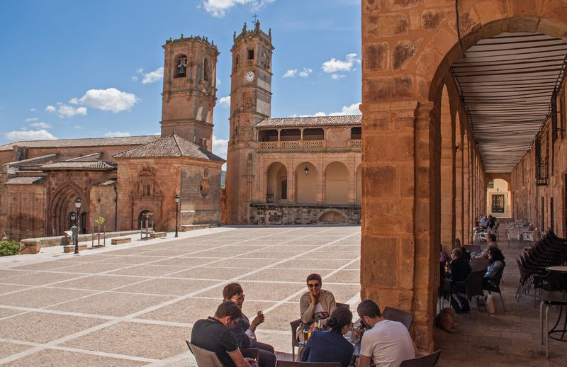 Plaza de Alcaraz